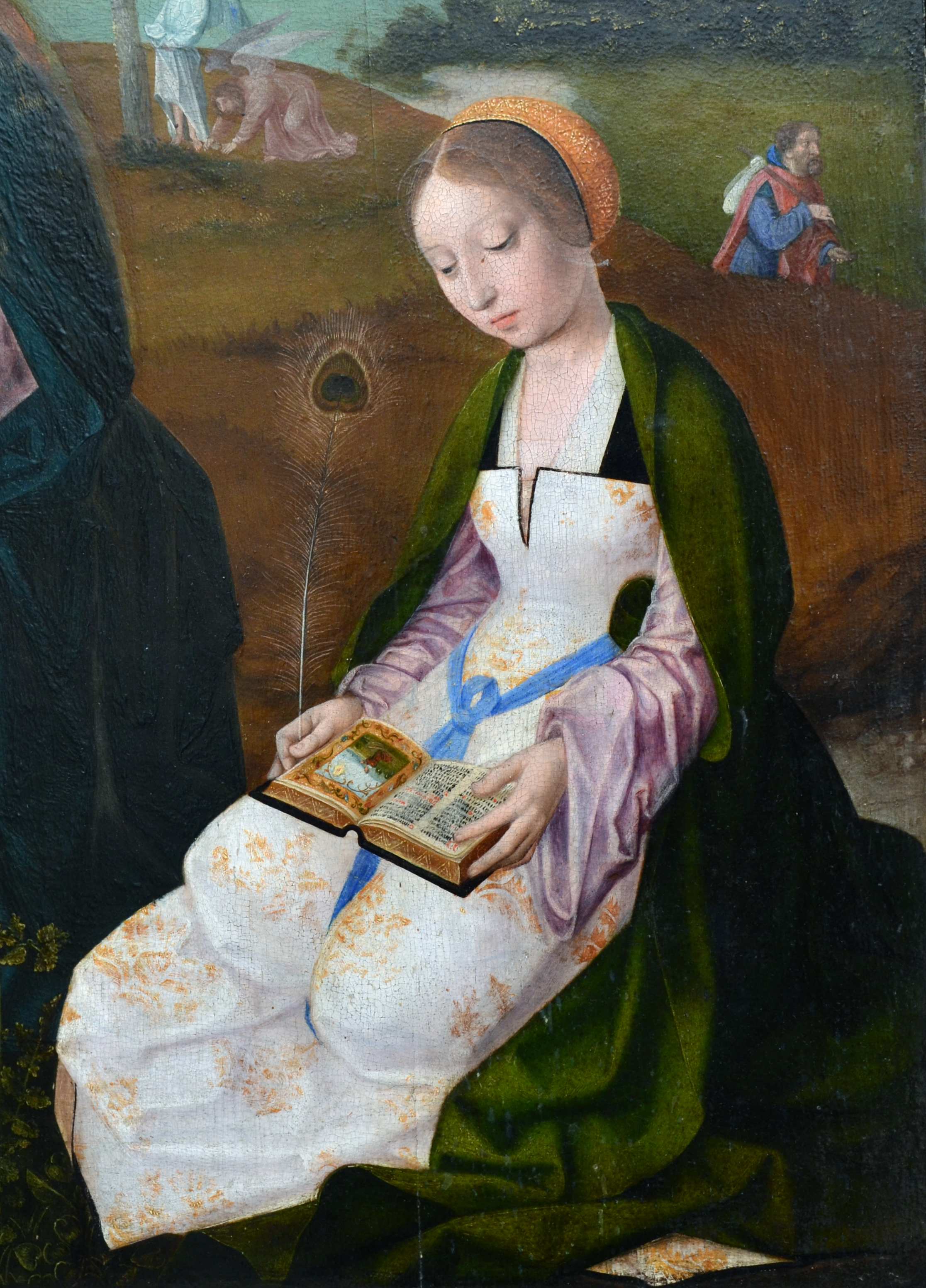 Madonna with the saints Catherine and Barbara, by the Master of the Holy Blood, oil on panel, 1509-1529. Detail : Saint Barbara. Groeningemuseum.